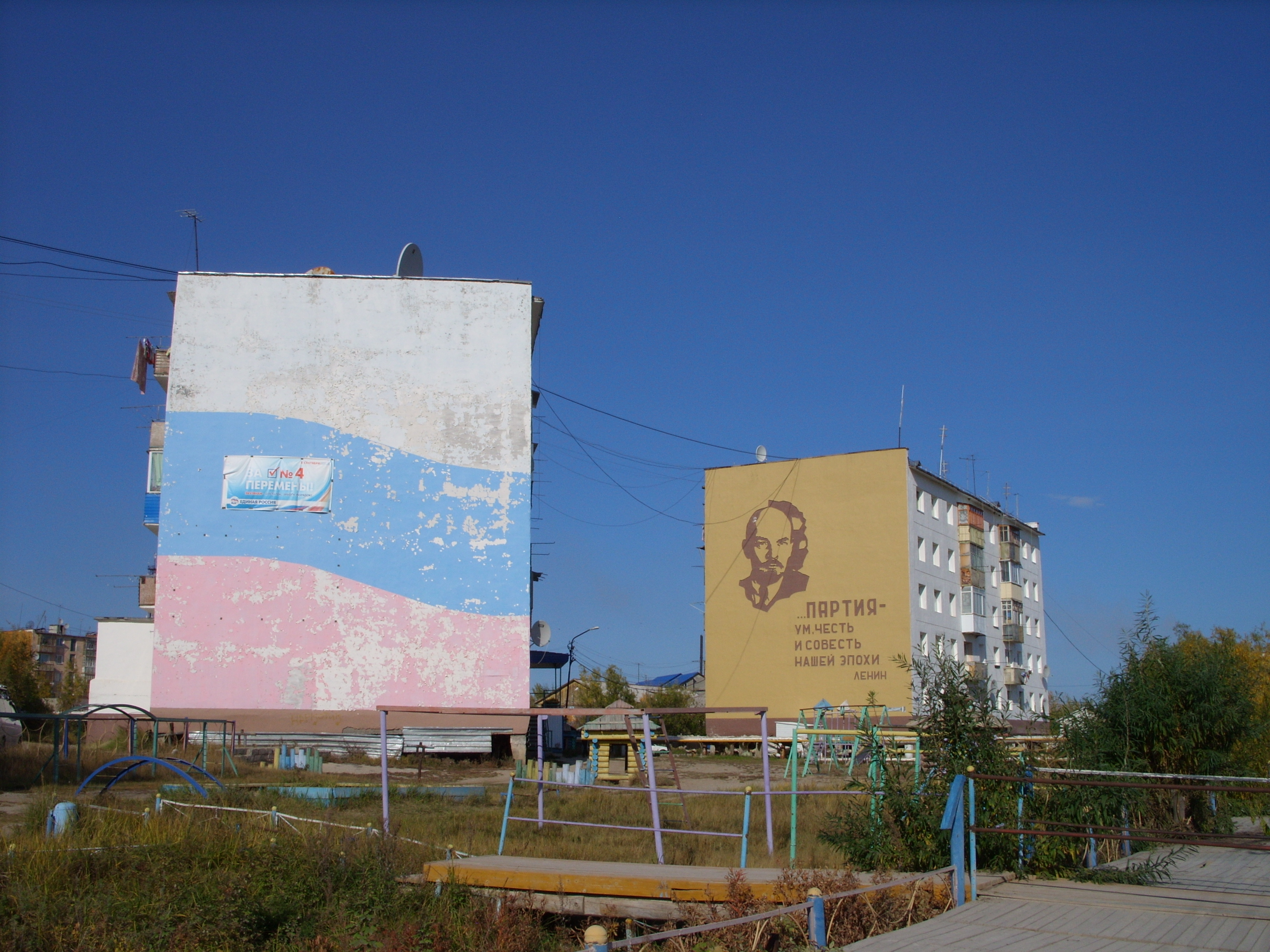 ул. Заводская